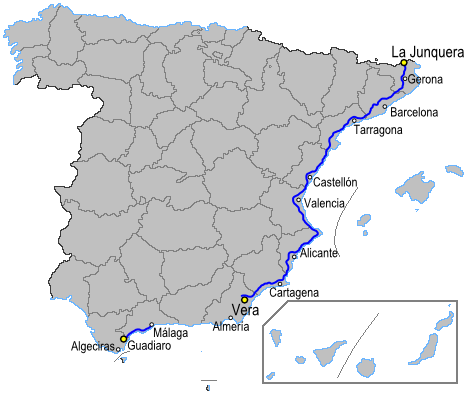 Mapa de la autopista AP7